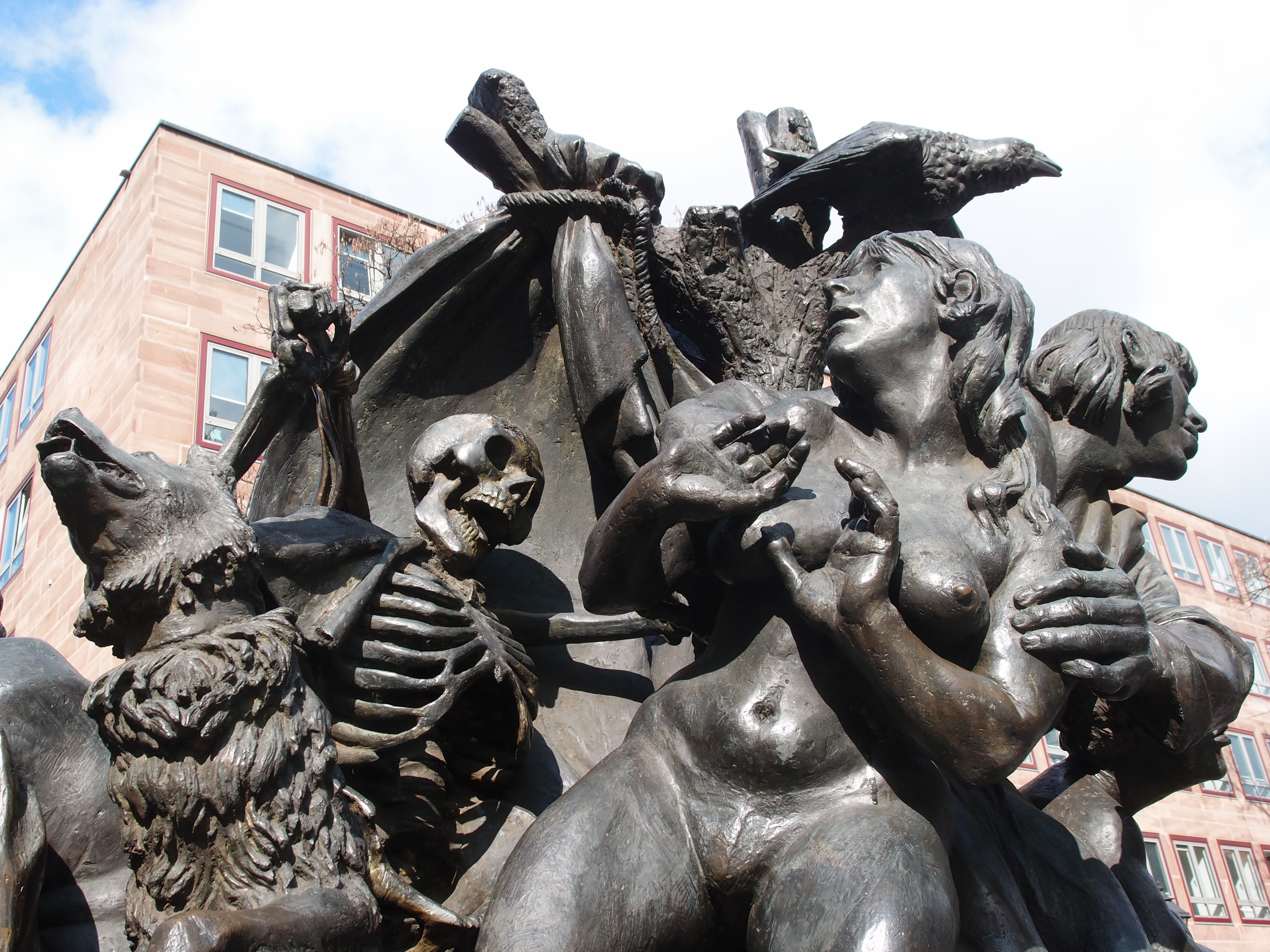 Detailansicht des "Narrenschiffbrunnens" in Nürnberg (Skulptur von Jürgen Weber) Datum: 19.03.2012 Urheber: M. Pfeiffer alias Benutzer:Gordito1869 privates Fotoarchiv des Urhebers